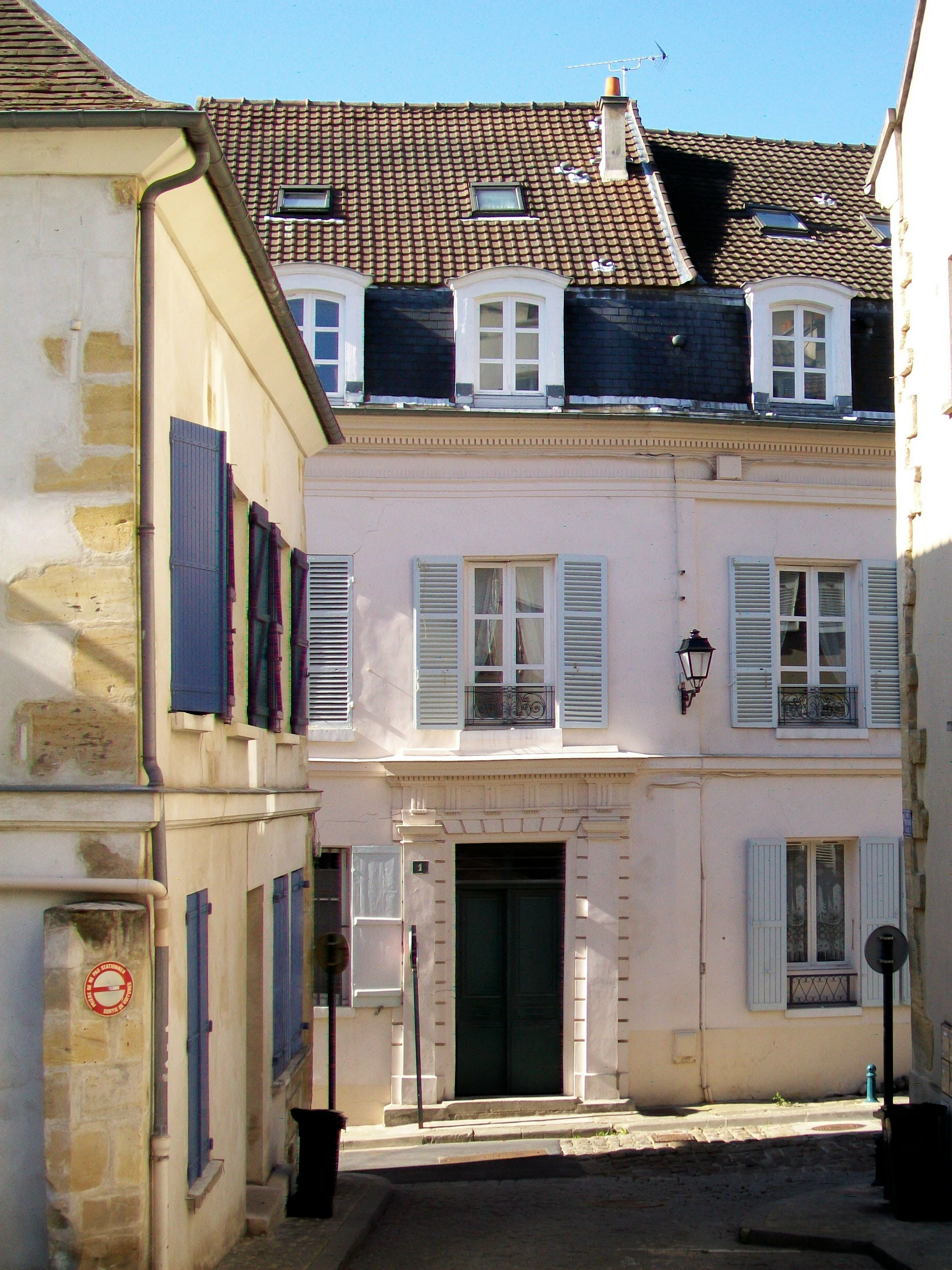 La maison natale du célèbre spéléologue Édouard-Alfred Martel (1859-1939),1 rue de la forêt Hardelot.